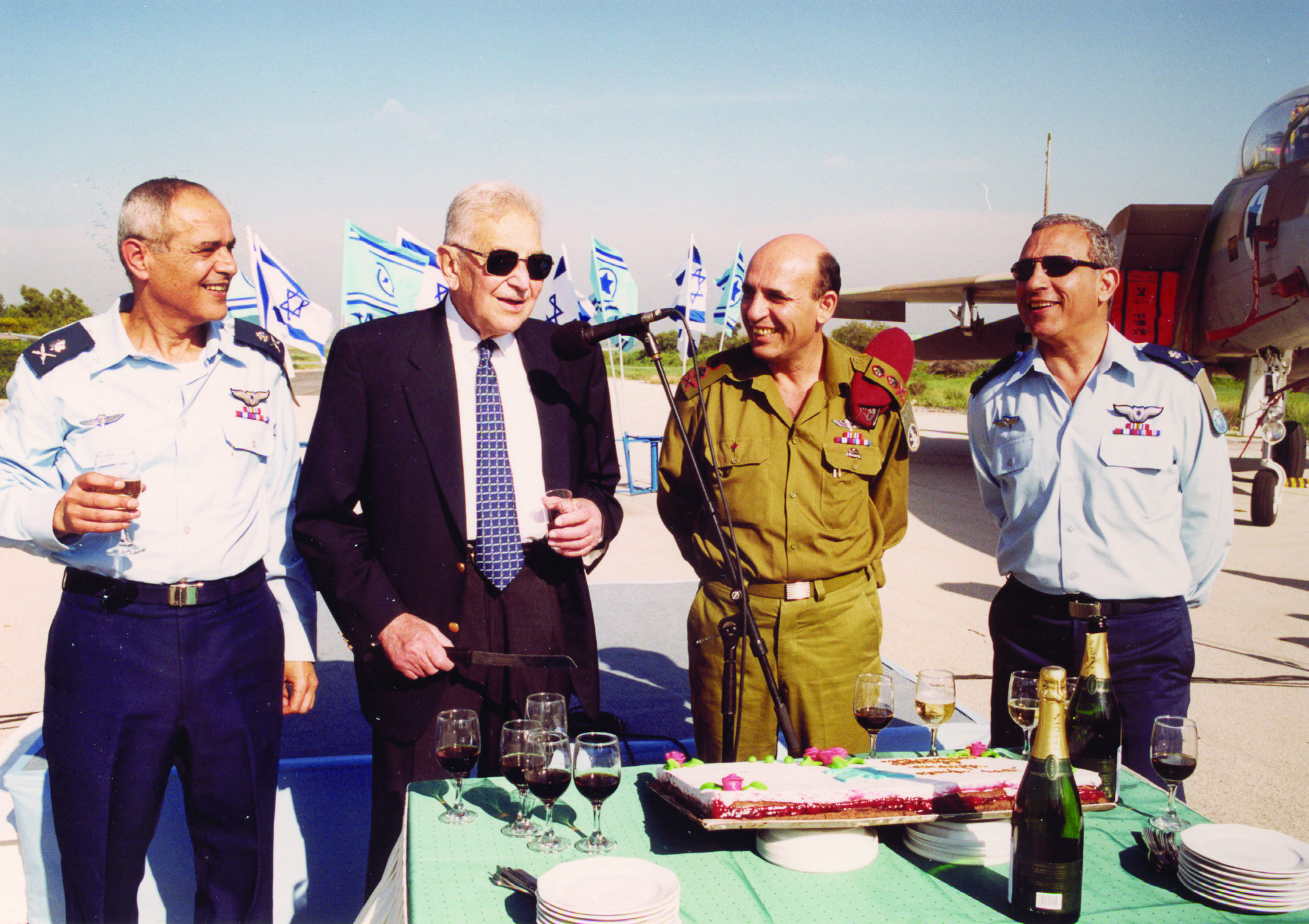 קבלת פיקוד על חיל האוויר. מימין: איתן בן אליהו, שאול מופז, עזר ויצמן, דני חלוץ